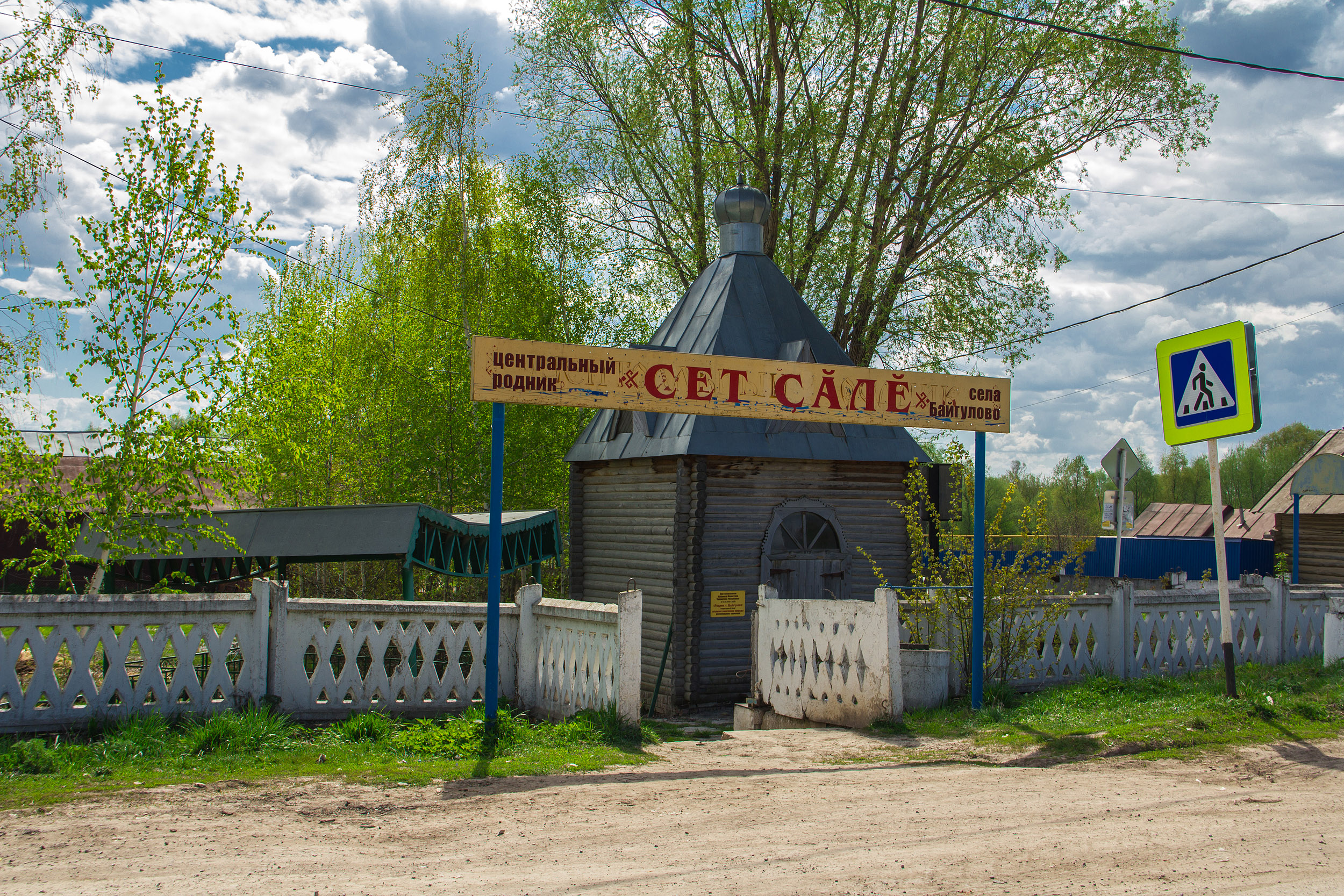 Родник села Байгулово, Козловский район. Чӑвашла: Сет çалĕ. Куснар ял, Куславка районĕ This image is related to the protected area of Russia number 2110077